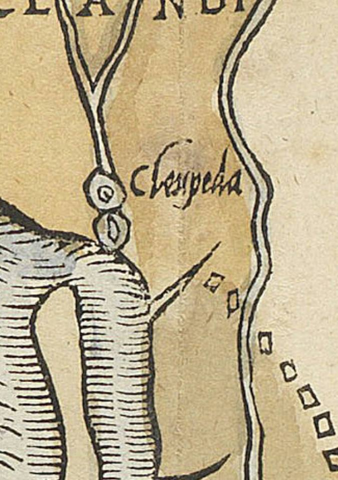 Клайпеда на карте Prussia vetus авторства Каспара Геннебергера (Caspar Hennebeger), 1684.